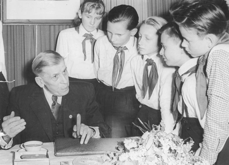 Dippoldiswalde, Jugendstunden, Otto Buchwitz Zentralbild Löwe 6.3.1958 Höhepunkt der Jugendstunden Otto Buchwitz erzählt aus seinem Leben Höhepunkt der Jugendstunden im Erzgebirgskreis Dippoldiswalde war am 5.3.1958 ein Besuch des Arbeiterveteranen Otto Buchwitz in den kleinen Ort Glashütte, wo er vor 150 Kindern aus seinem bewegten Leben erzählte. (siehe auch ADN-Meldung 210 vom 6.3.1958) UBz: Otto Buchwitz im Kreise von Teilnehmern der Jugendstunde.